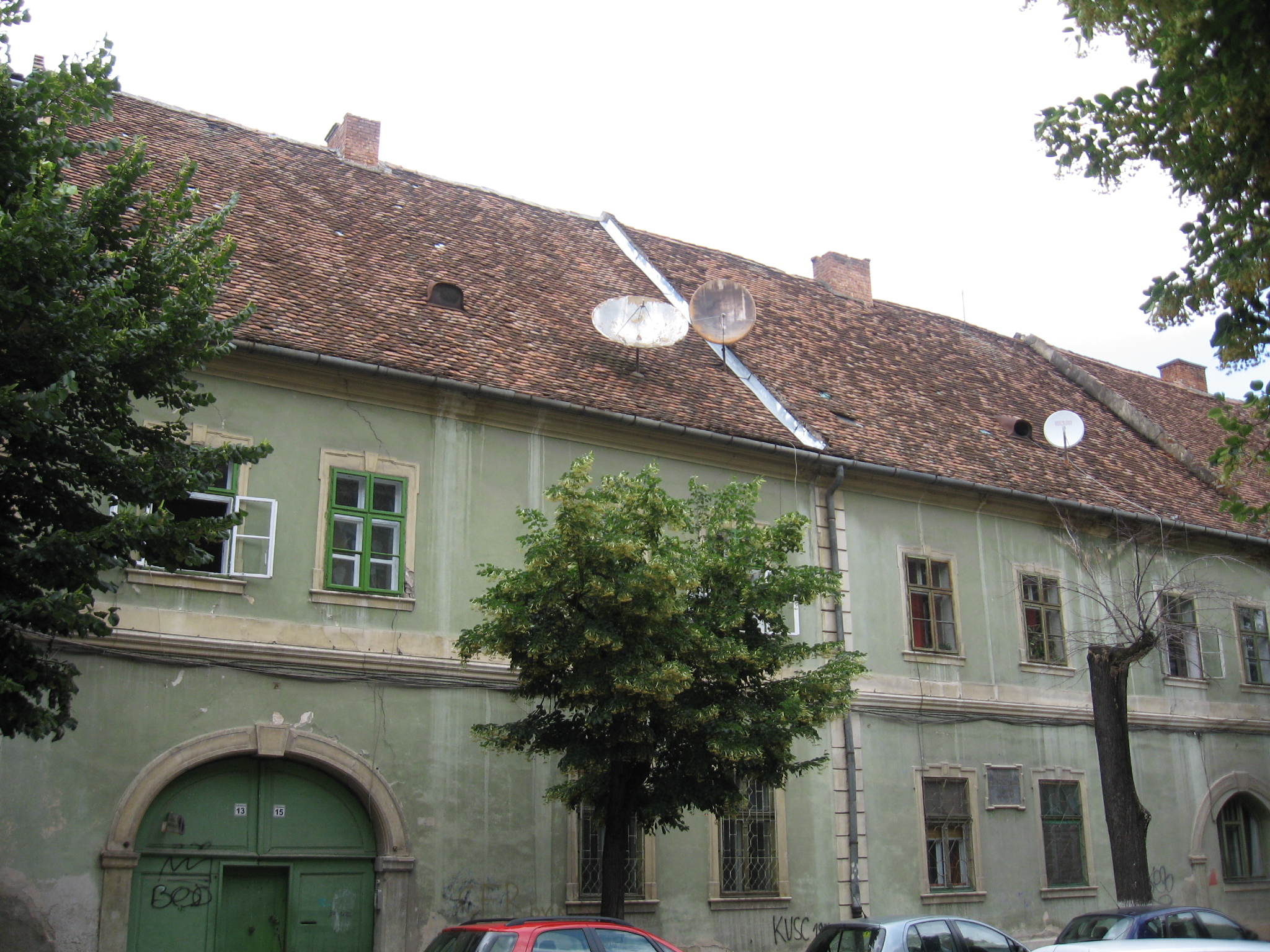 Cluj-Napoca, Casele profesorilor de pe Uliţa Lupilor (azi str.M.Kogălniceanu)